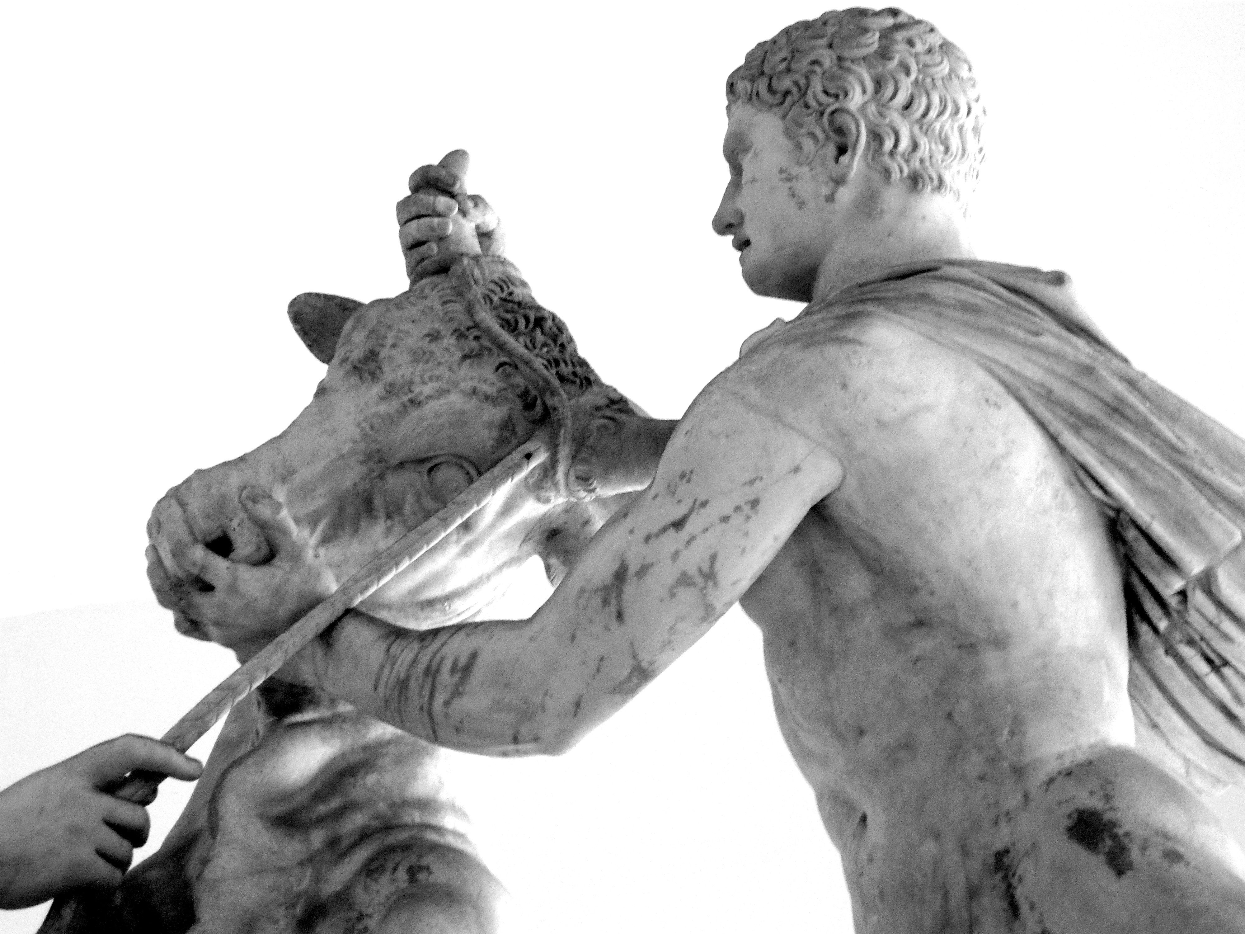 dettaglio del Toro Farnese, Napoli, Museo Archeologico Nazionale. Autore foto: Roberto De Martino